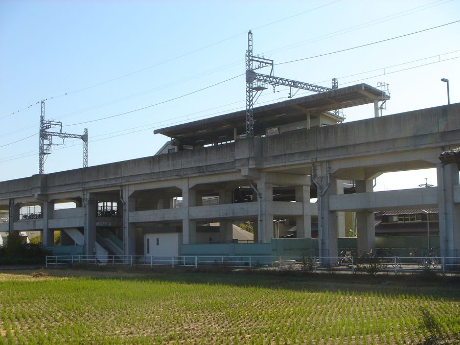 烏江駅（岐阜県養老町・養老鉄道養老線（撮影当時は近鉄）） 撮影：投稿者(Monami)、撮影日：2005年11月